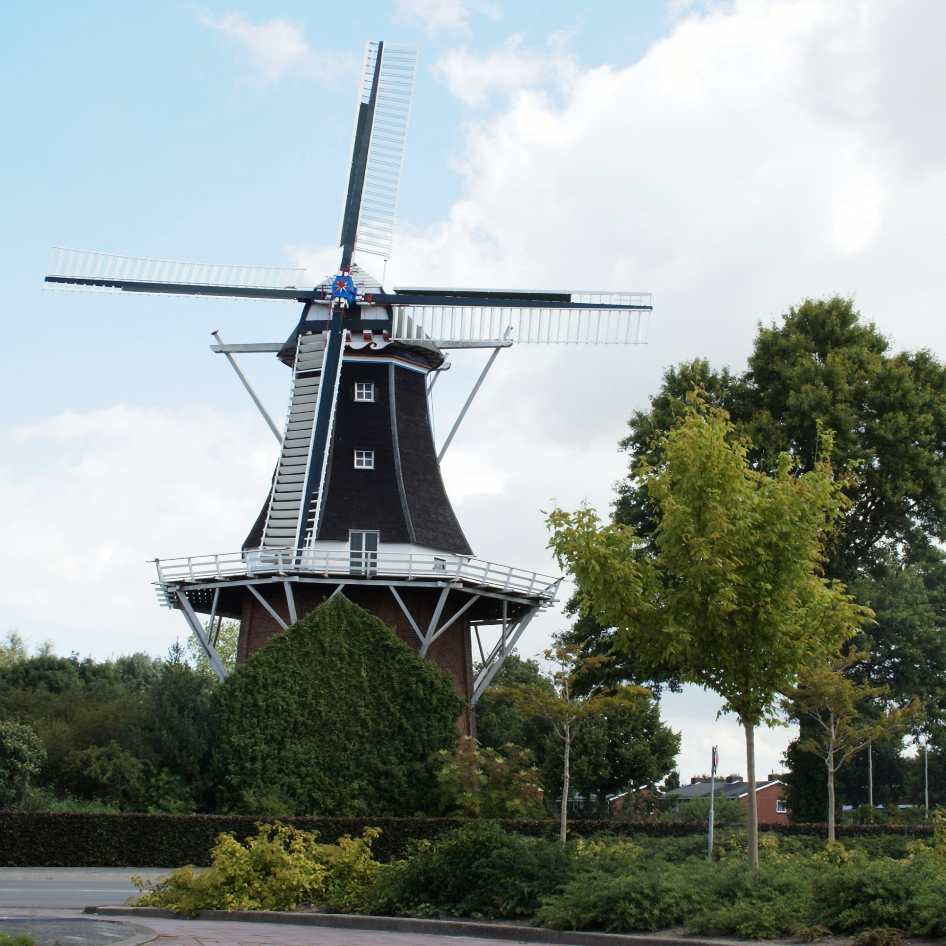 Molen Berg in Winschoten